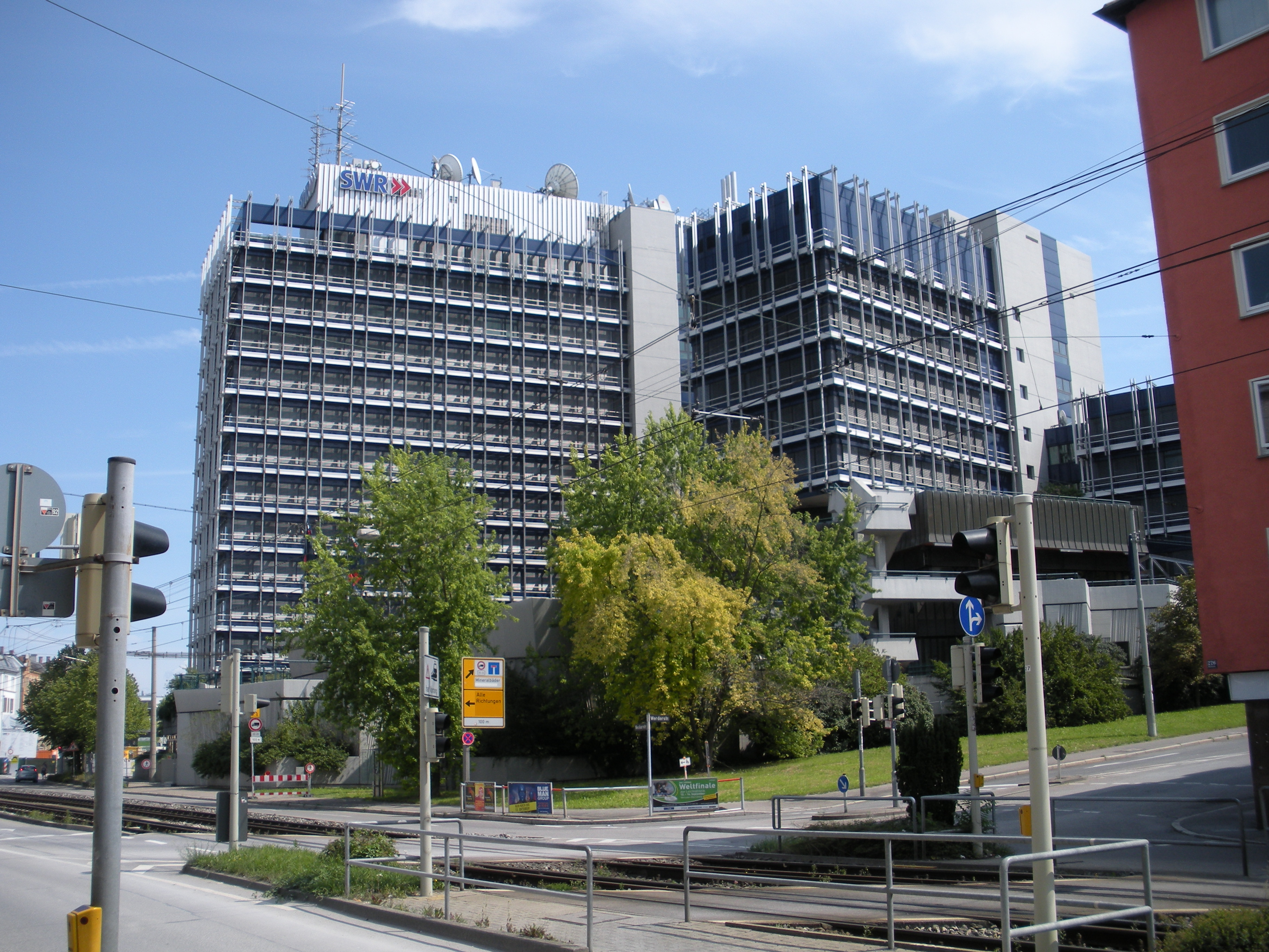 Südwestrundfunk (SWR) in Stuttgart-Ost